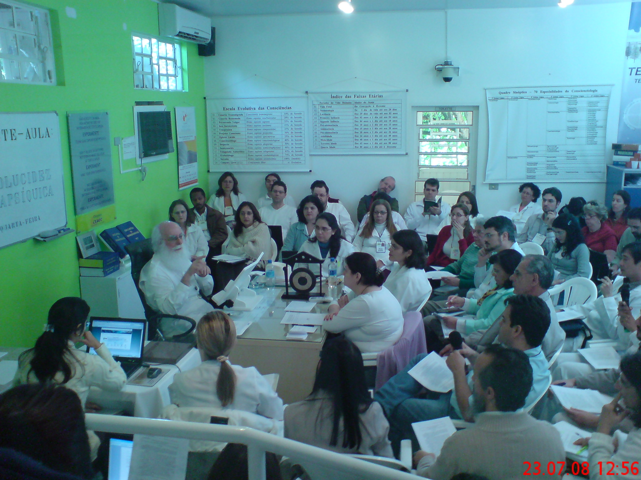 Retrato de uma tertúlia realizada por Waldo Vieira no refeitório do CEAEC, antes da construção do Tertuliarium (2008).